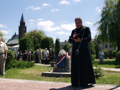 כומר מספיד את יהודי לוטוטוב-יוני2010